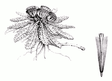 Senecio repens illustration [1]